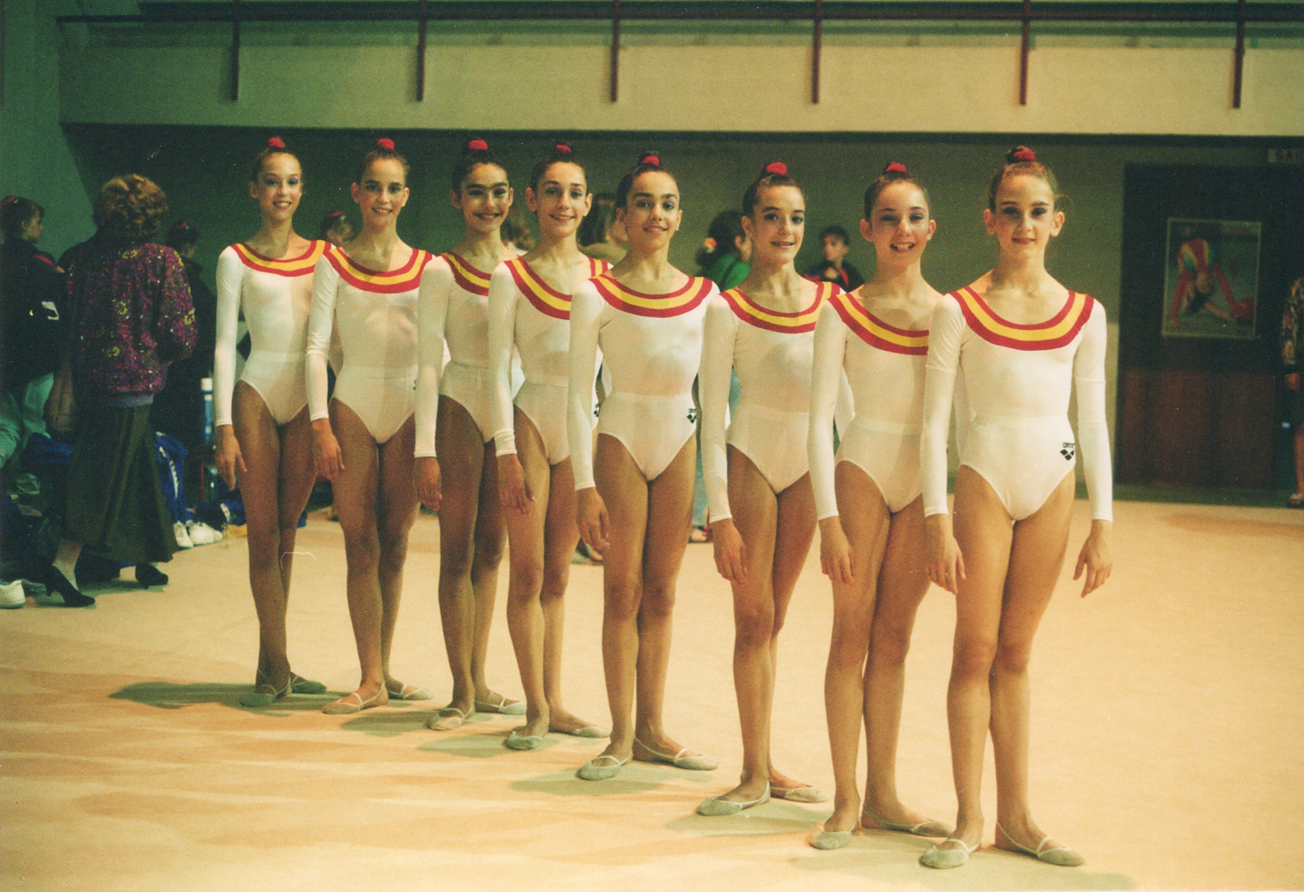 Conjunto español júnior que fue campeón de Europa júnior en 1991, durante una exhibición en el Gimnasio Moscardó de Madrid ese mismo año. En la foto aparecen las titulares María Álvarez, Sonia Bermejo, Verónica Bódalo (quinta), Susana Gómez (primera), Pilar Rodrigo y Eva Velasco, además de las suplentes Estefanía Ariza y Laura Bartolomé.